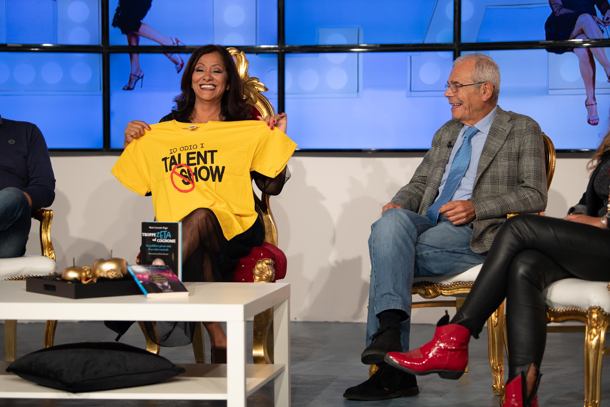 Mario Luzzatto Fegiz al talk show "Il Salotto di Leandra" per raccontare del suo spettacolo teatrale "io odio i talent show",in scena all'Ariston. Ove il critico non salirà più sul palco da critico ma da artista.